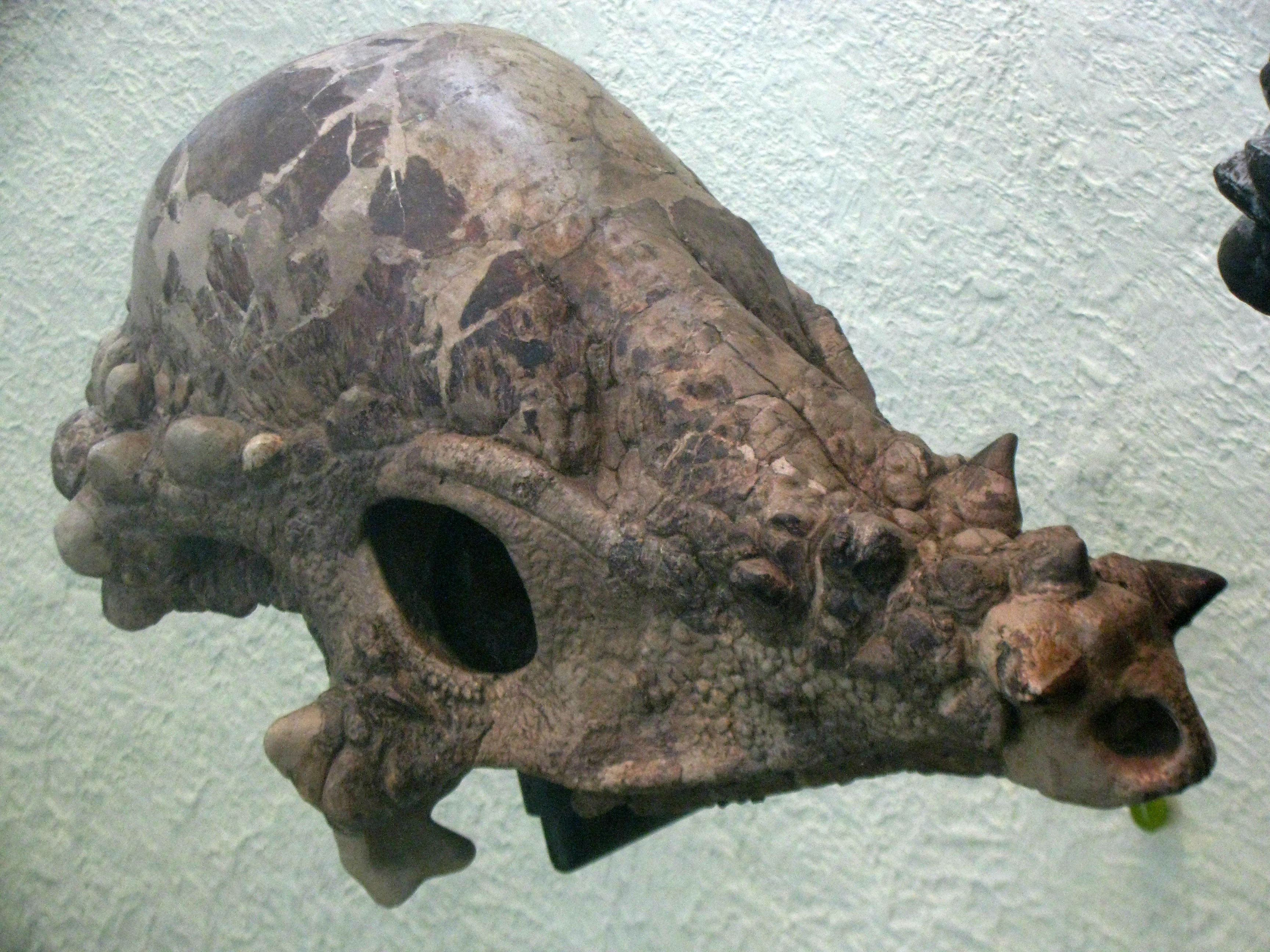 Pachycephalosaurus skull AMNH 1696